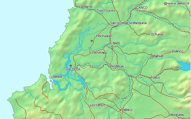 Valdivia, Niebla